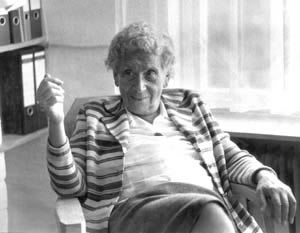 Medical Emmi Pikler